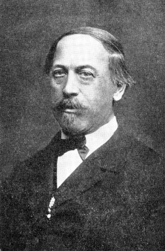 Jindřich Wankel ve svých 50. letech